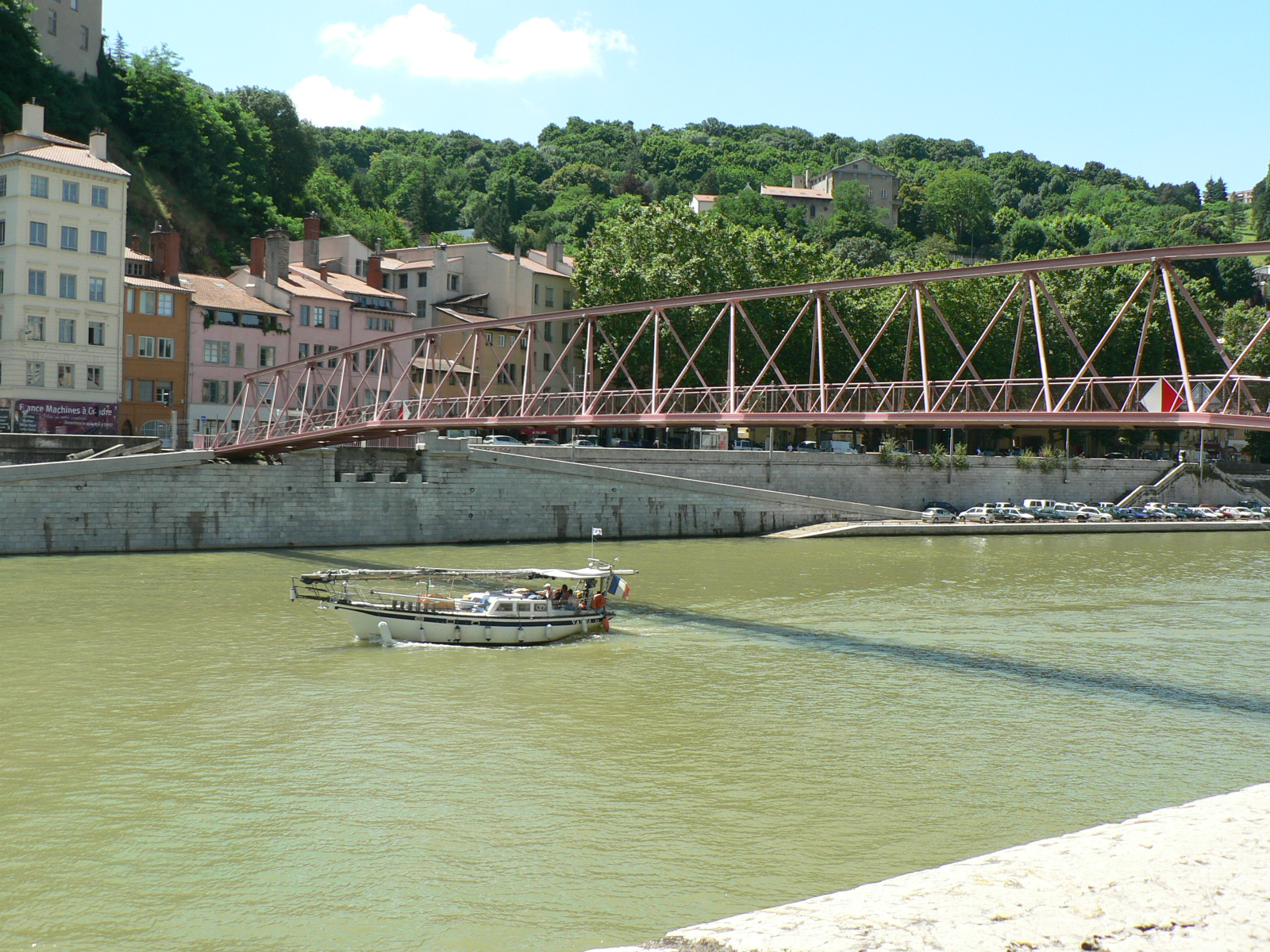 Ponts de Lyon - Passerelle de l'Homme de la Roche